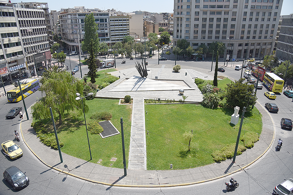 Πλατεία Καραϊσκάκη-Μεταξουργείου